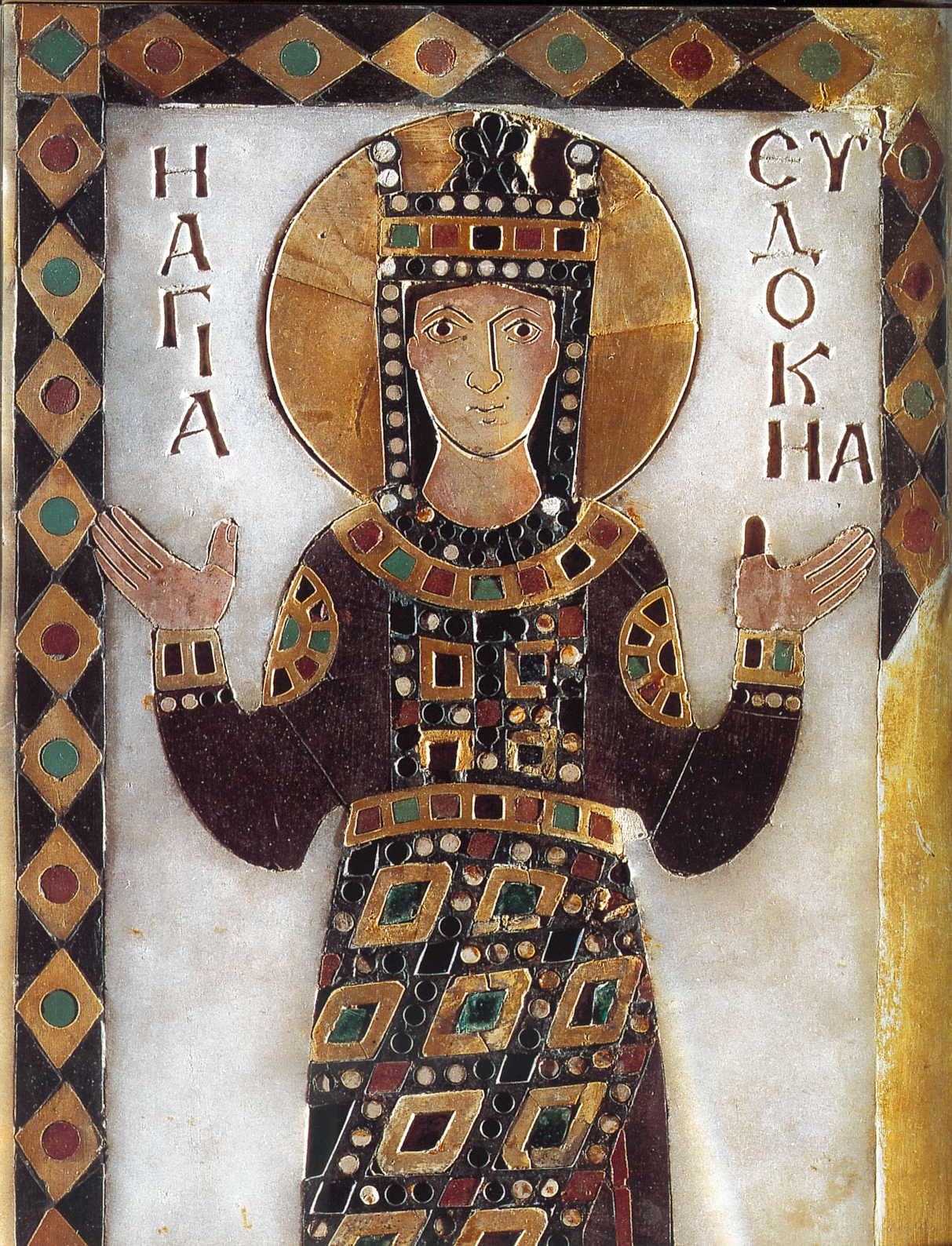 Ikone der Heiligen Eudokia, Einlegearbeit in Stein und Elfenbein, 10. Jh.